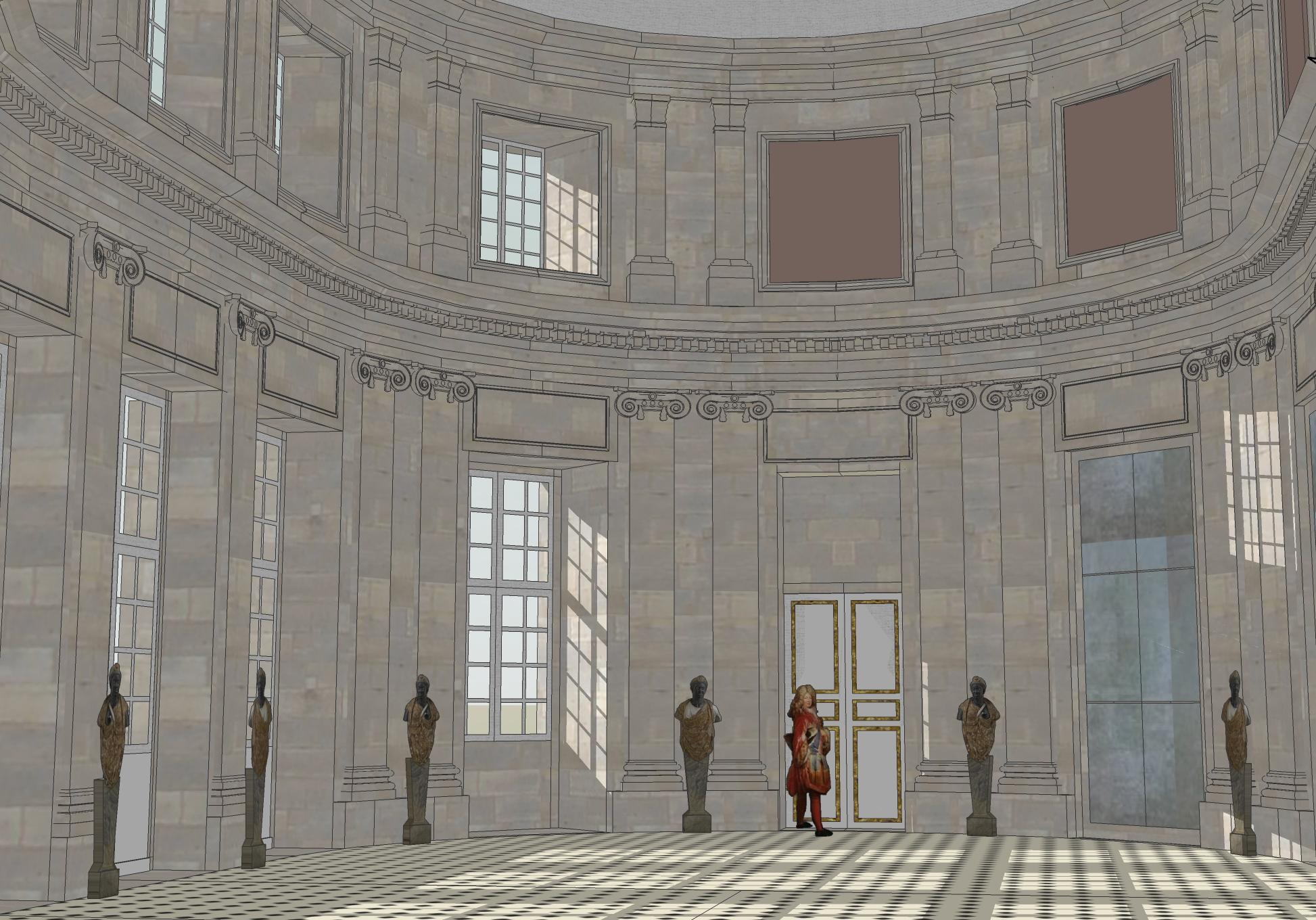 Description Restitution virtuelle du Salon des Maures, situé au premier étage du Château-Vieux de Meudon, XVIIe siècle. Date18 April 2012Sourceordinateur personnel de Franck DevedjianAuthorFranck Devedjian, né le 12/08/1981 franckdevedjian at hotmail pt com Restitution virtuelle du Salon des Maures, situé au premier étage du Château-Vieux de Meudon, XVIIe siècle.